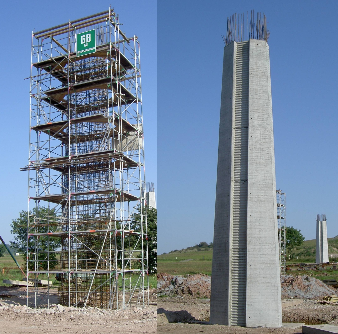 Stahlbetonpfeiler der Talbrücke Brünn mit Stahlbewehrung und fertig betoniert